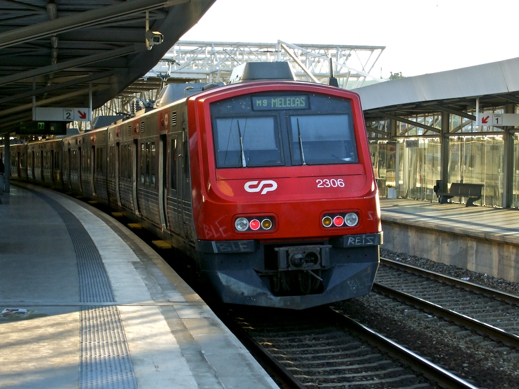 Tipo: Comboio Urbano 18271 [Roma • Areeiro - Mira Sintra • Meleças] Local: Estação de Sete Rios [Linha de Cintura, PK 4] Data e hora: 9 de Julho de 2008 [20h21] Material: Automotoras 23xx e 2306 [Unidades Quádruplas Eléctricas]